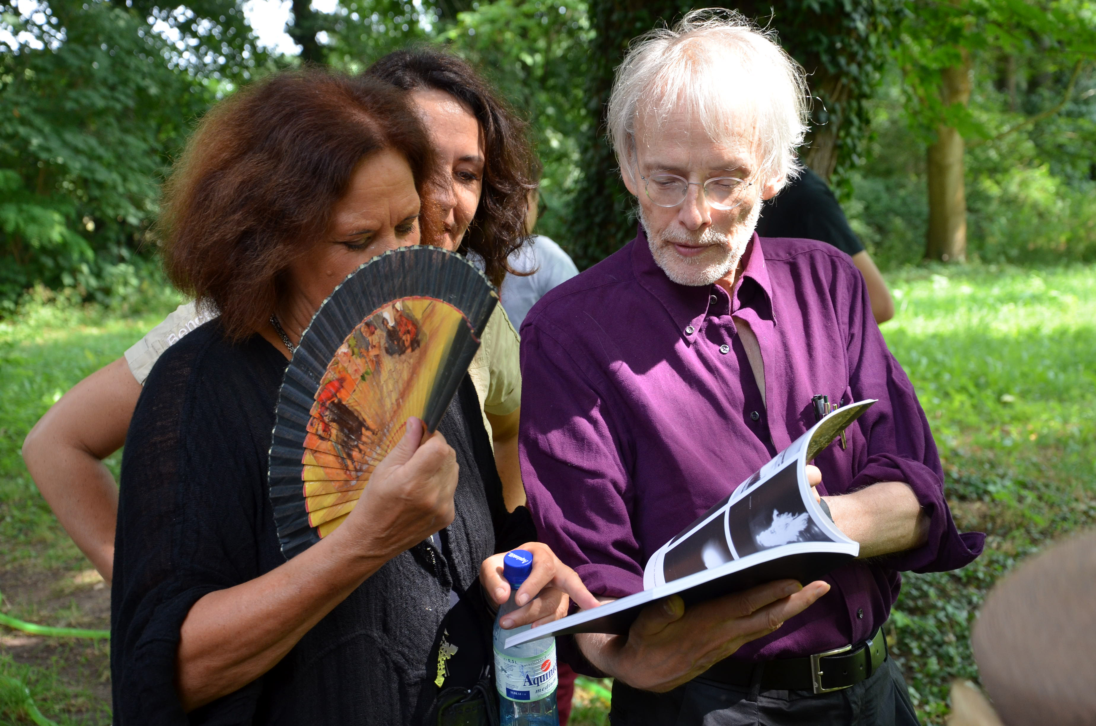 Am Tag der Pressekonferenz zu der ab dem 1. August 2013 präsentierten Freiluft-Ausstellung WasserKunst: Zwischen Deich und Teich in der historischen Parkanlage vom Edelhof Ricklingen in Hannover erläutert der Totalkünstler Timm Ulrichs seinen Künstler-Kolleginnen Dagmar Brand (links) und Susanne Hoffmann Details aus einem Kunstkatalog ...